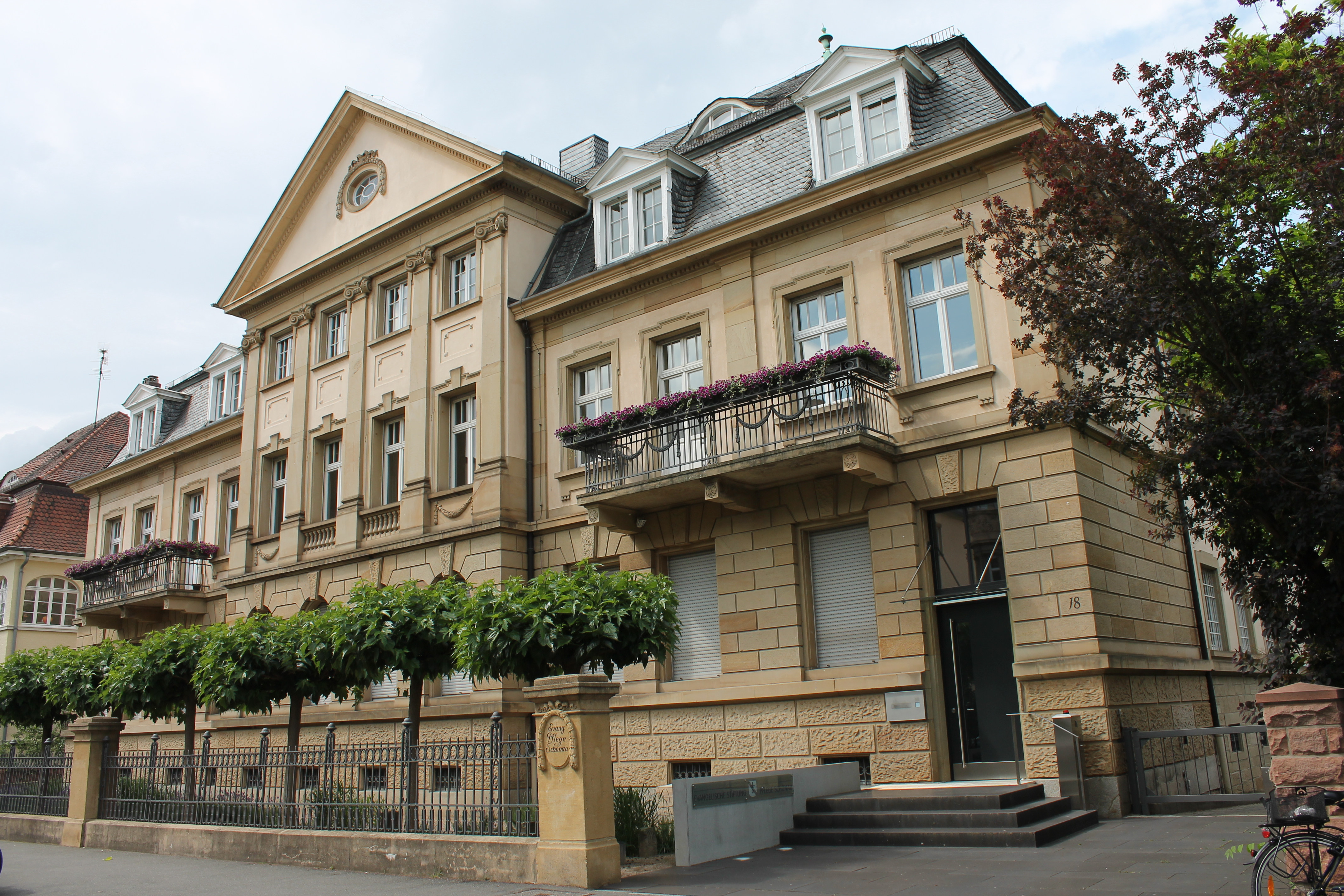 Sitz der evangelischen Stiftung Pflege Schönau in der Zähringstraße in Heidelberg